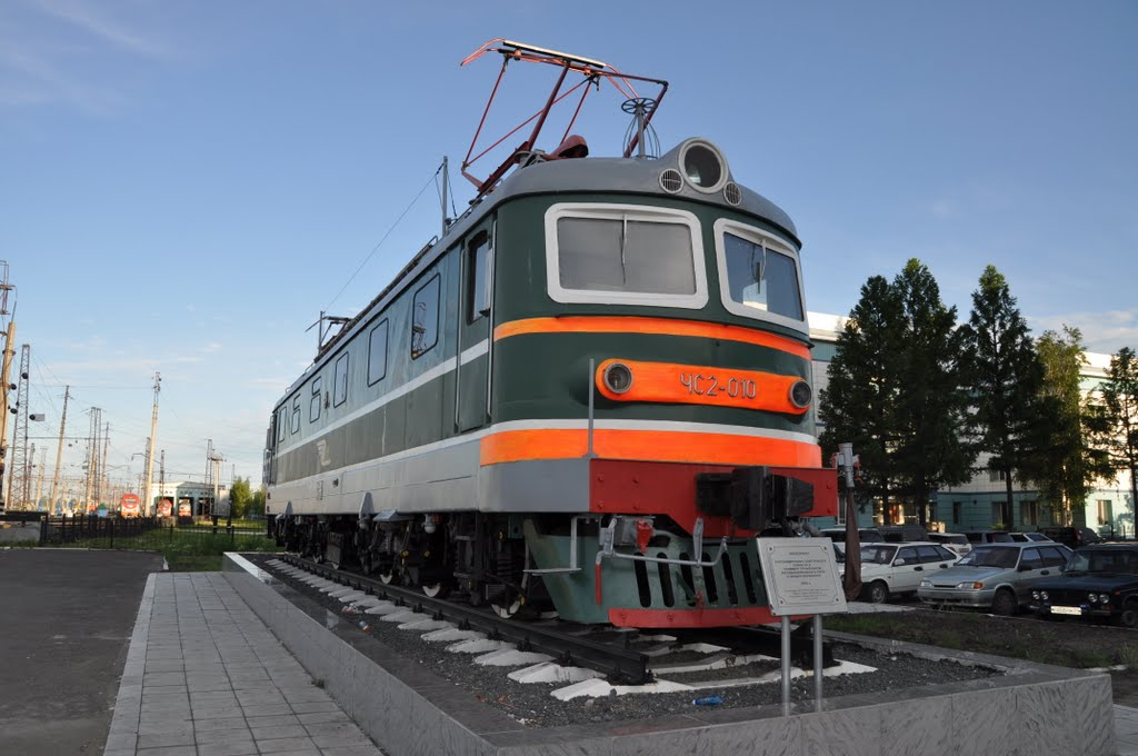 Электровоз ЧС2-010 на станции Барабинск